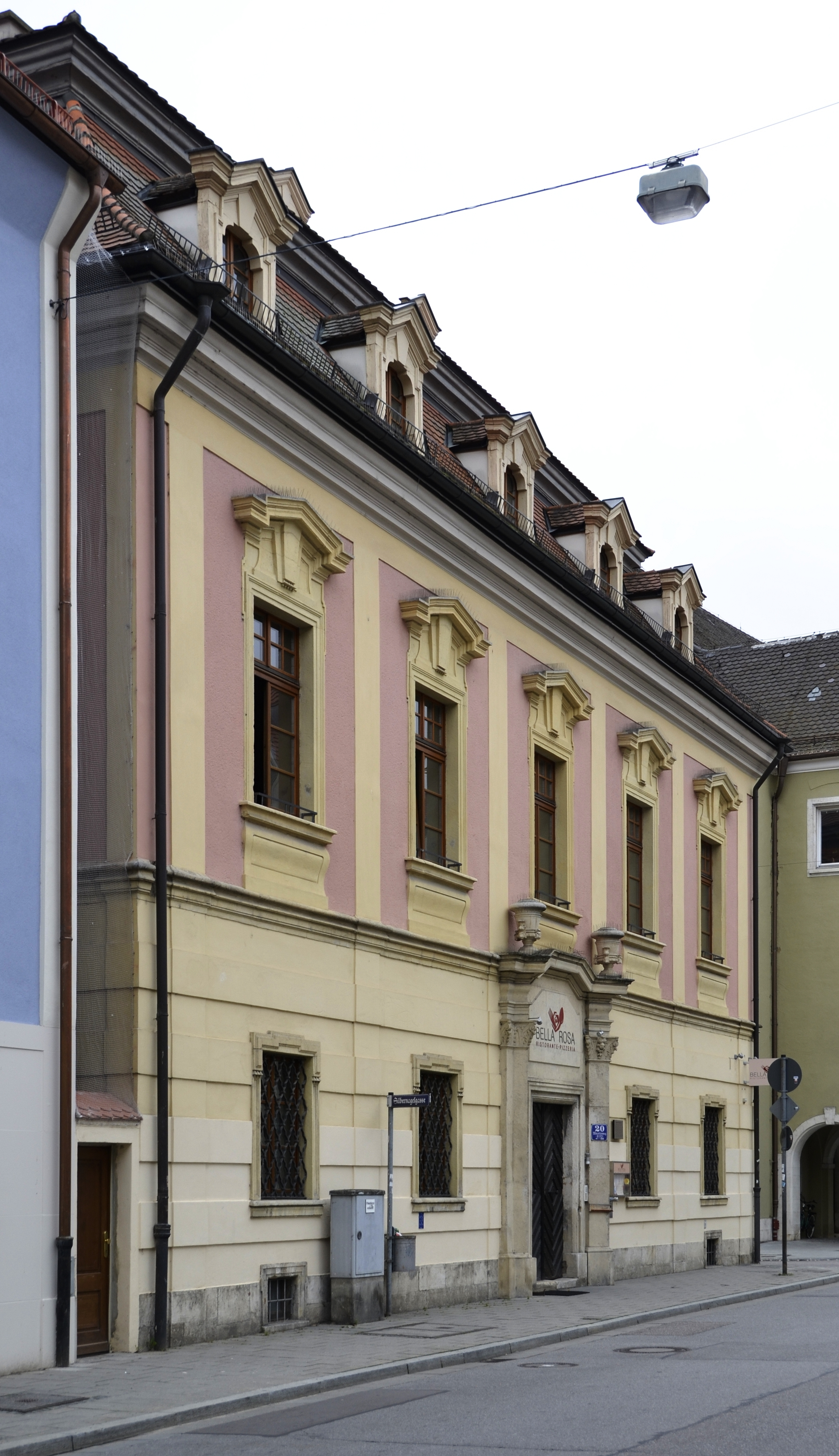 Das Gebäude "Minoritenweg 20" (Innenstadt/Ostnerwacht) in Regensburg, Bayern.